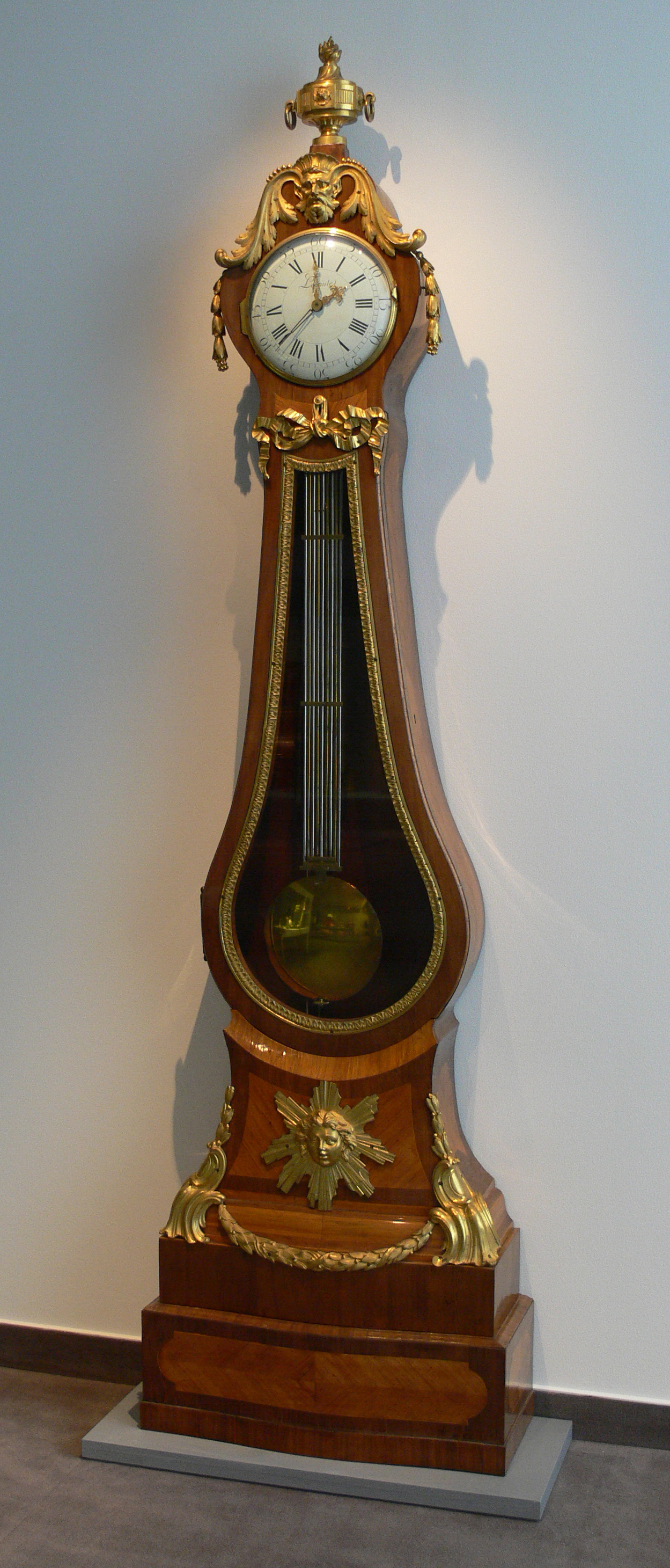 Präzuisions-Bodenstanduhr mit Monats-Äquationswerk, Gewichtsantrieb und endloser Schnur; Rosen- und Veilchenholz auf Eiche, feuervergoldete Bronzeappliken Hersteller: Nicolas Petit; Uhrwerk: Lepaute, Paris, um 1770 Kunstgewerbemuseum Berlin, Inv. Nr. 1980,91